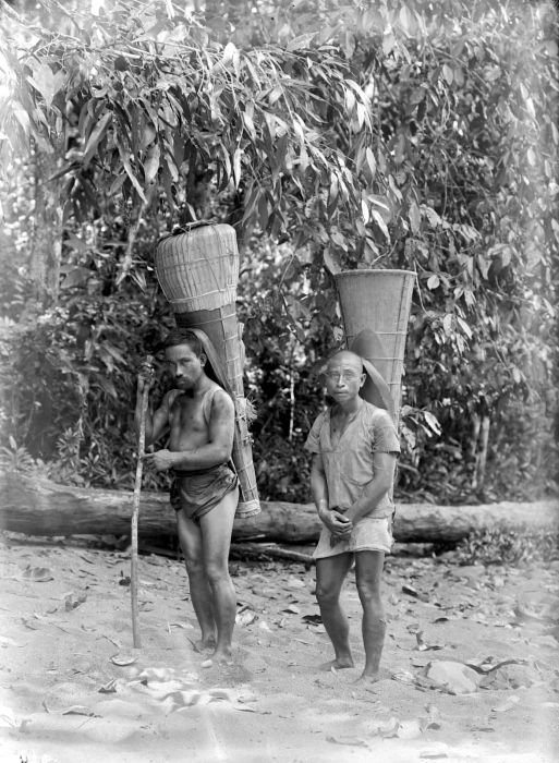 Negatief. Veel Molukkers waren geen landbouwers maar bosgebruikers. Sago en bananen, de twee voornaamste soorten voedsel, komen van bomen (al is de bananenboom geen echte boom). Ook kruidnagelen en nootmuskaat kwamen oorspronkelijk uit het bos. Voor de verschillende palmen die eet- en drinkbare producten opleveren (zoals palmwijn), gold dat uiteraard ook. Bomen leverden ook producten voor de handel op. Hiervan is de kopal, de hars van Agathis dammara of Agathis alba, een goed voorbeeld. Er waren nog wel meer 'bosbijproducten' die door de bevolking van de Molukken werden verzameld, zoals rotan. (P. Boomgaard, 2001). Transport van kopal te Halmahera